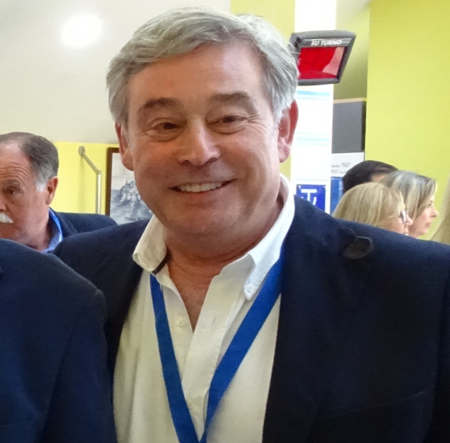 Juan José Imbroda et le porte-parole parlementaire au Sénat.